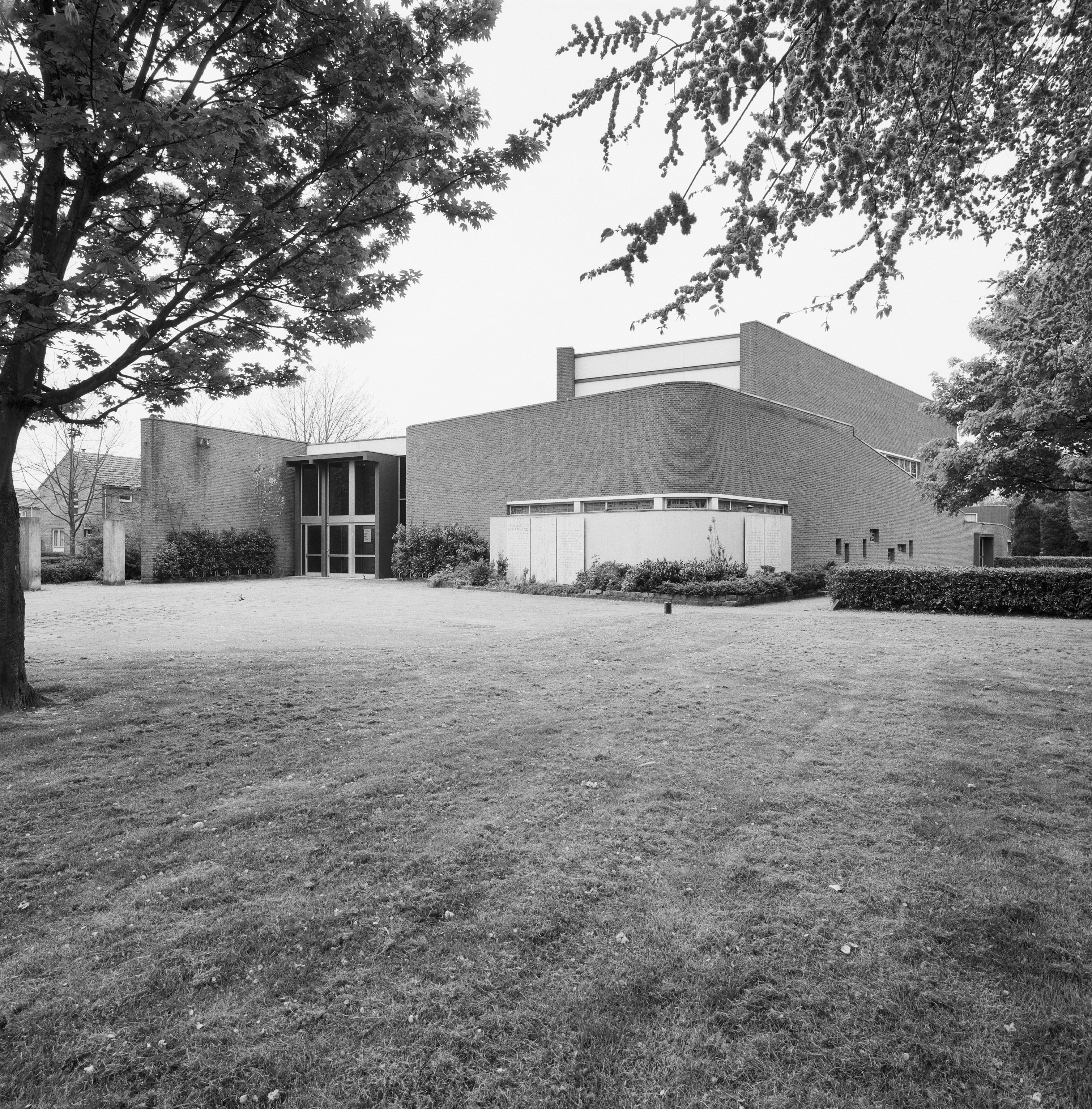 Christus Koningkerk: Overzicht met ingang